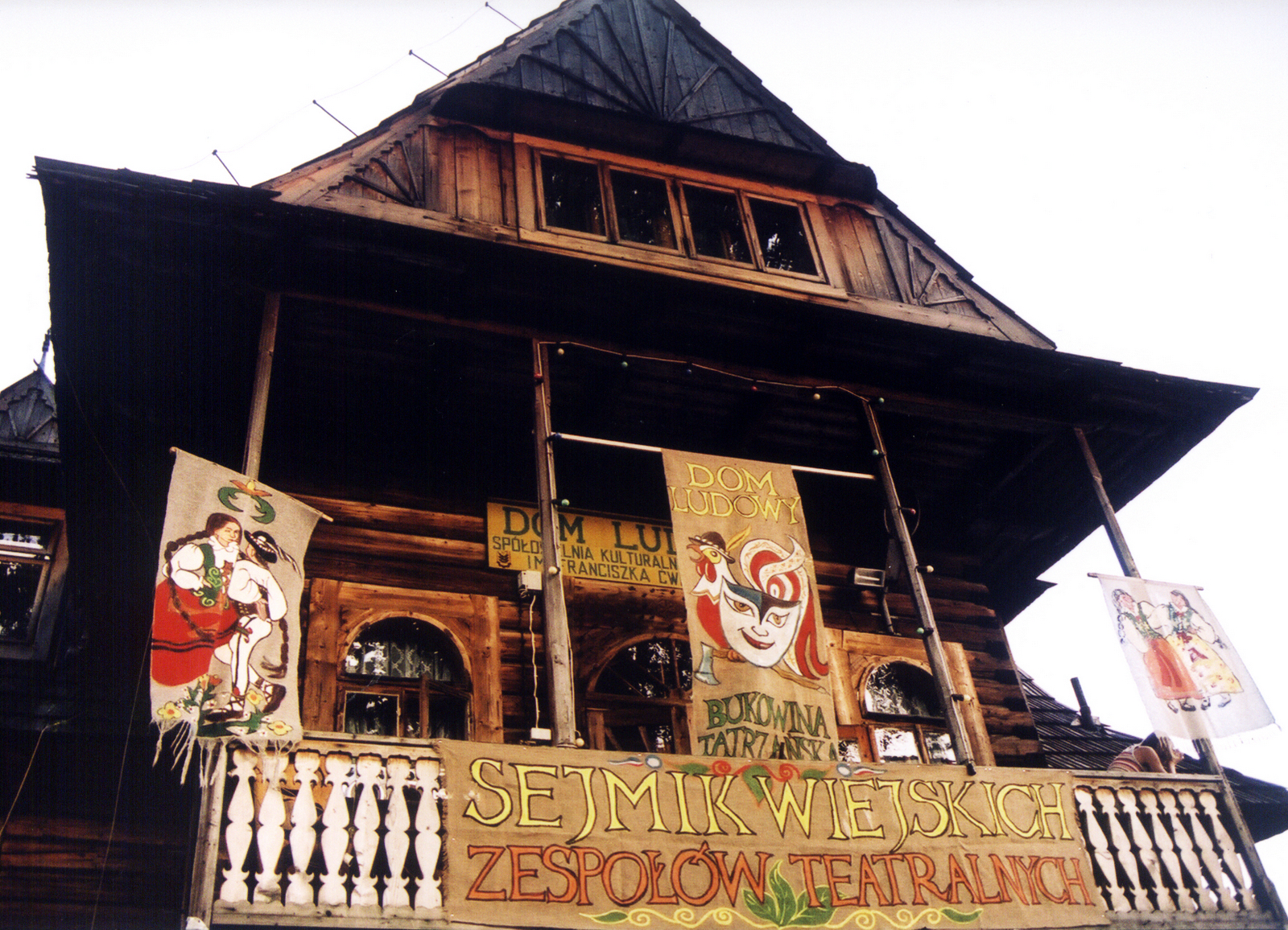 Bukowiańskie Centrum Kultury Dom Ludowy im. Franciszka Ćwiżewicza.